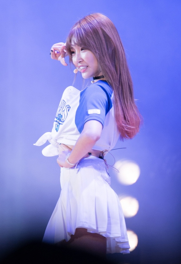 20160429 김청하 아이오아이 롯데월드 청춘 페스티벌